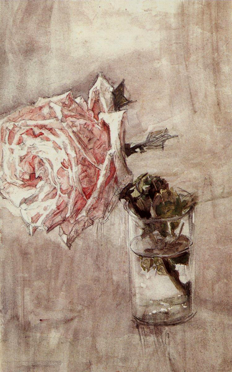 М. А. Врубель. Роза в стакане